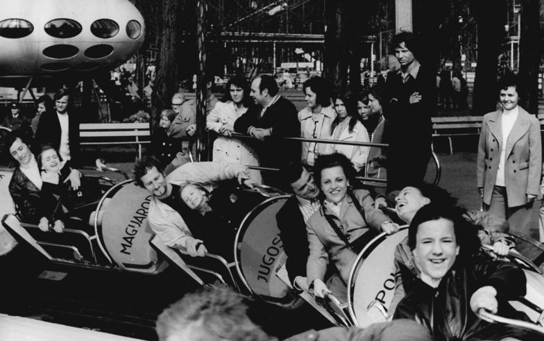 ADN-ZB Spremberg 31.3.1974 Berlin: Sonntagsspaß im Berliner Kulturpark: Rund ist die Welt und rund gehts auf der Bob-Bahn des Kulturparks im Plänterwald der DDR-Hauptstadt Berlin. Das warme Frühlingswetter lockte Tausende von Schaulustigen und "Aktiven" in die beliebte Vergnügungsstätte. (sehen Sie auch N0331/29N!). Jet Star, Kulturpark Plänterwald (Spreepark)